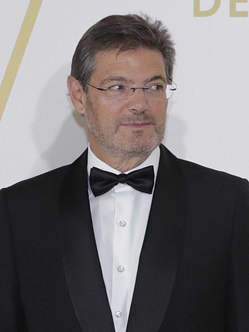 En los Premios Mariano de Cavia, Luca de Tena y Mingote 2016 de ABC, uno de los premios más prestigiosos de la prensa en España.